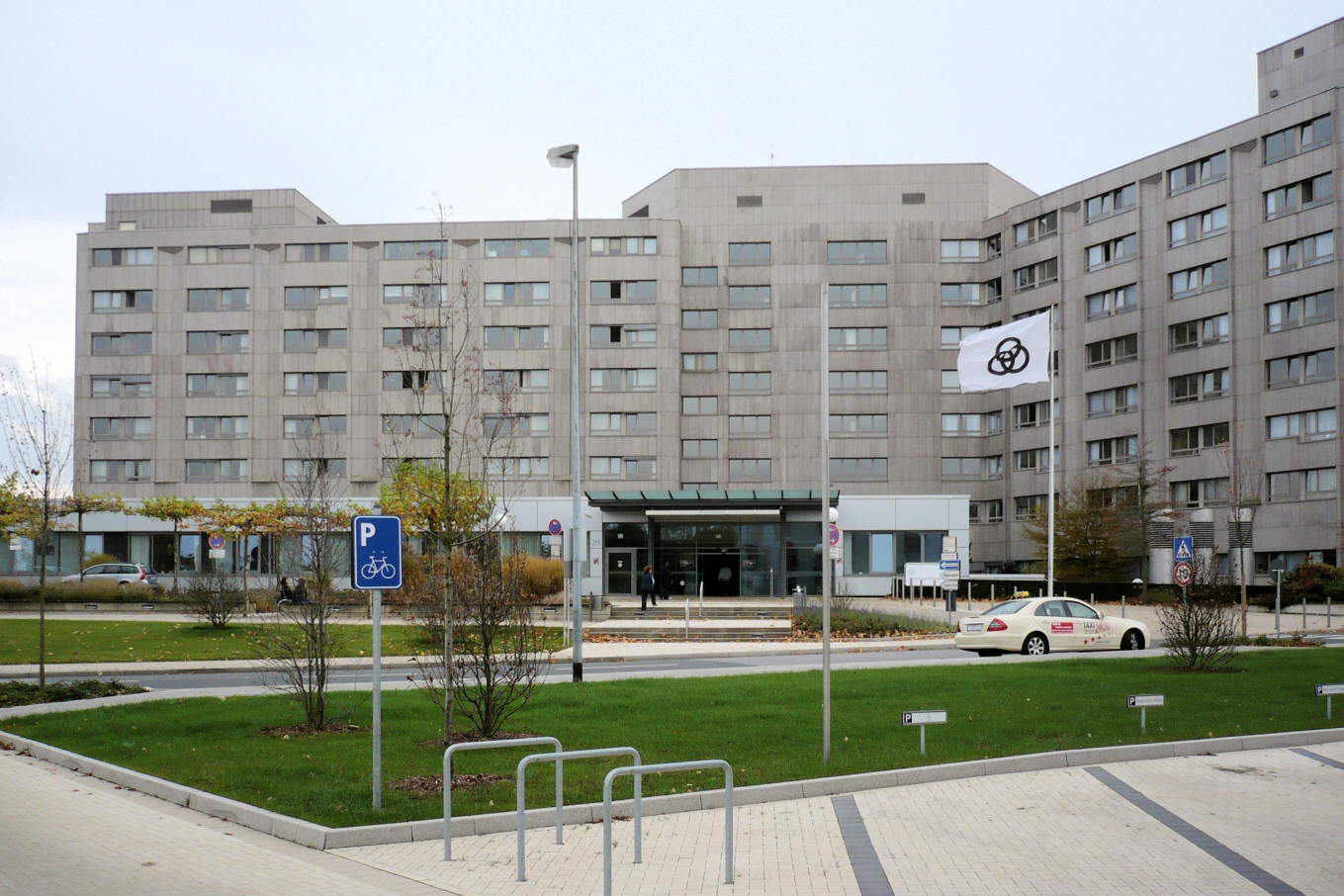 Alfried Krupp Krankenhaus, Essen-Rüttenscheid - Haupteingang